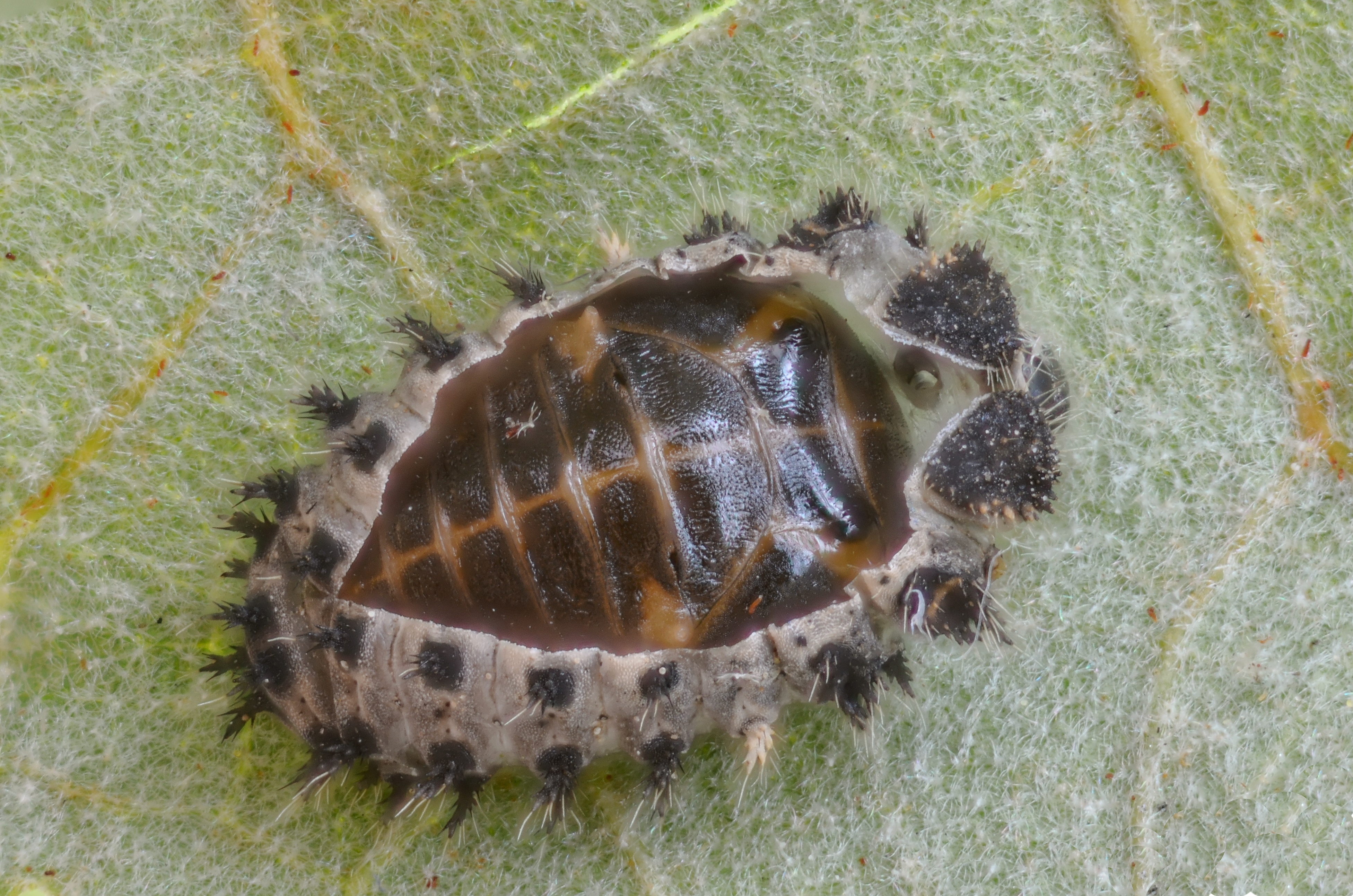 Exochomus quadripustulatus pupa